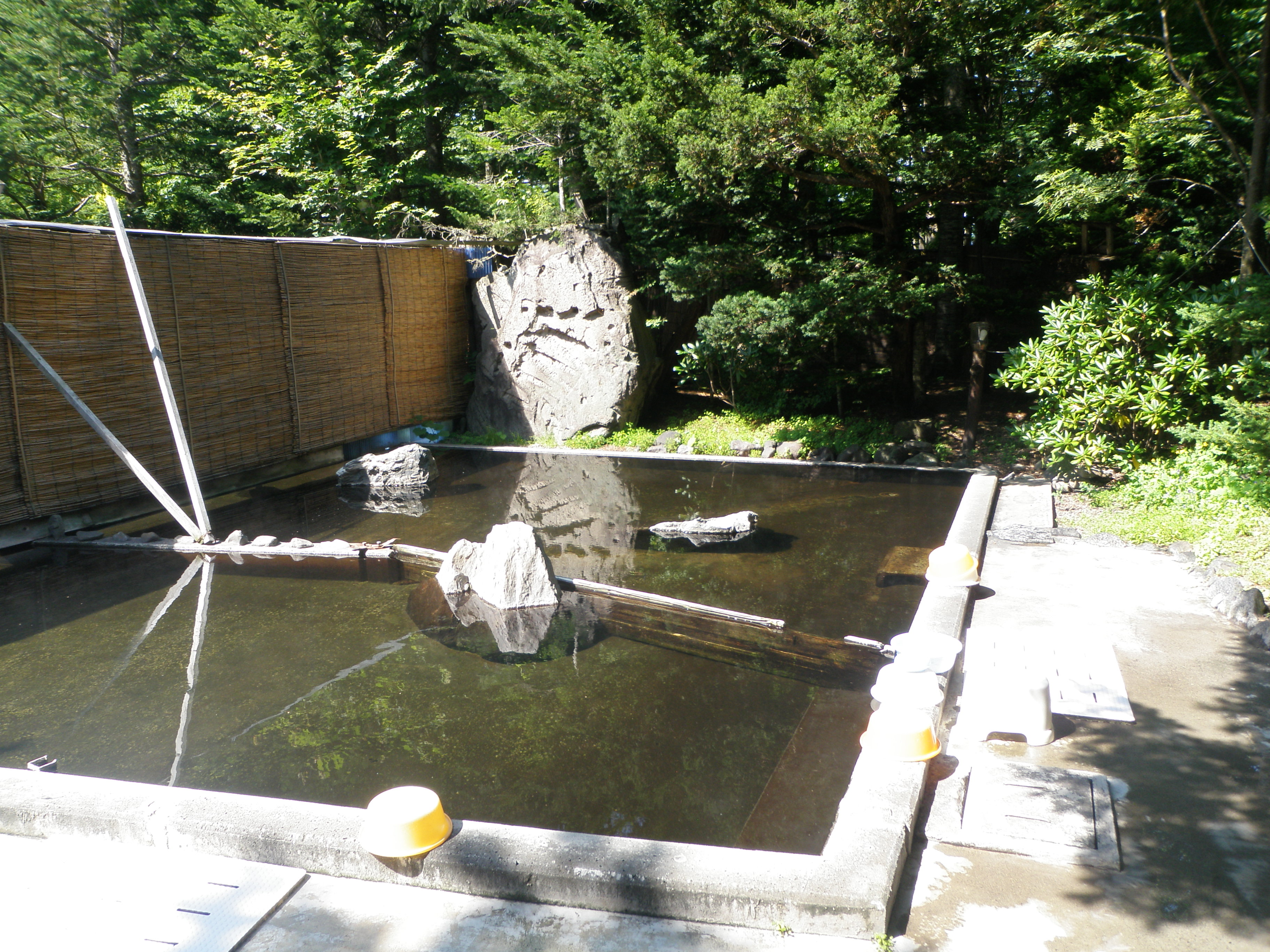 三香温泉露天風呂